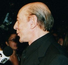 Brazilian actor Raul Cortez gives an interview.Raul Cortêz -Actor (In memorian)